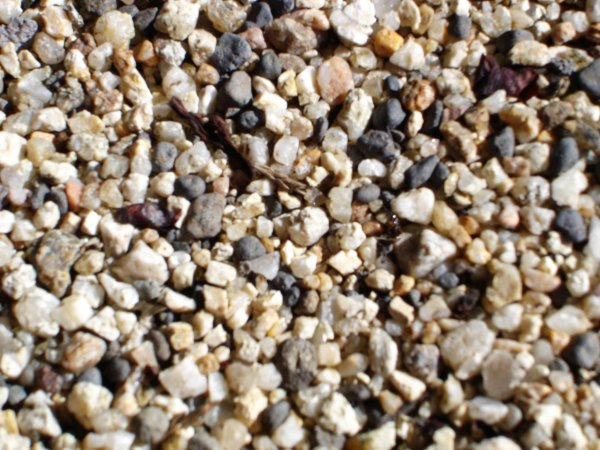 Sol de gore (granite décomposé) de couleur claire, région de Vichy (Auvergne, France)